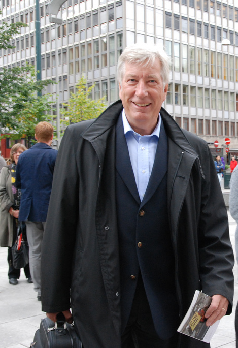 Sigbjørn Johnsen